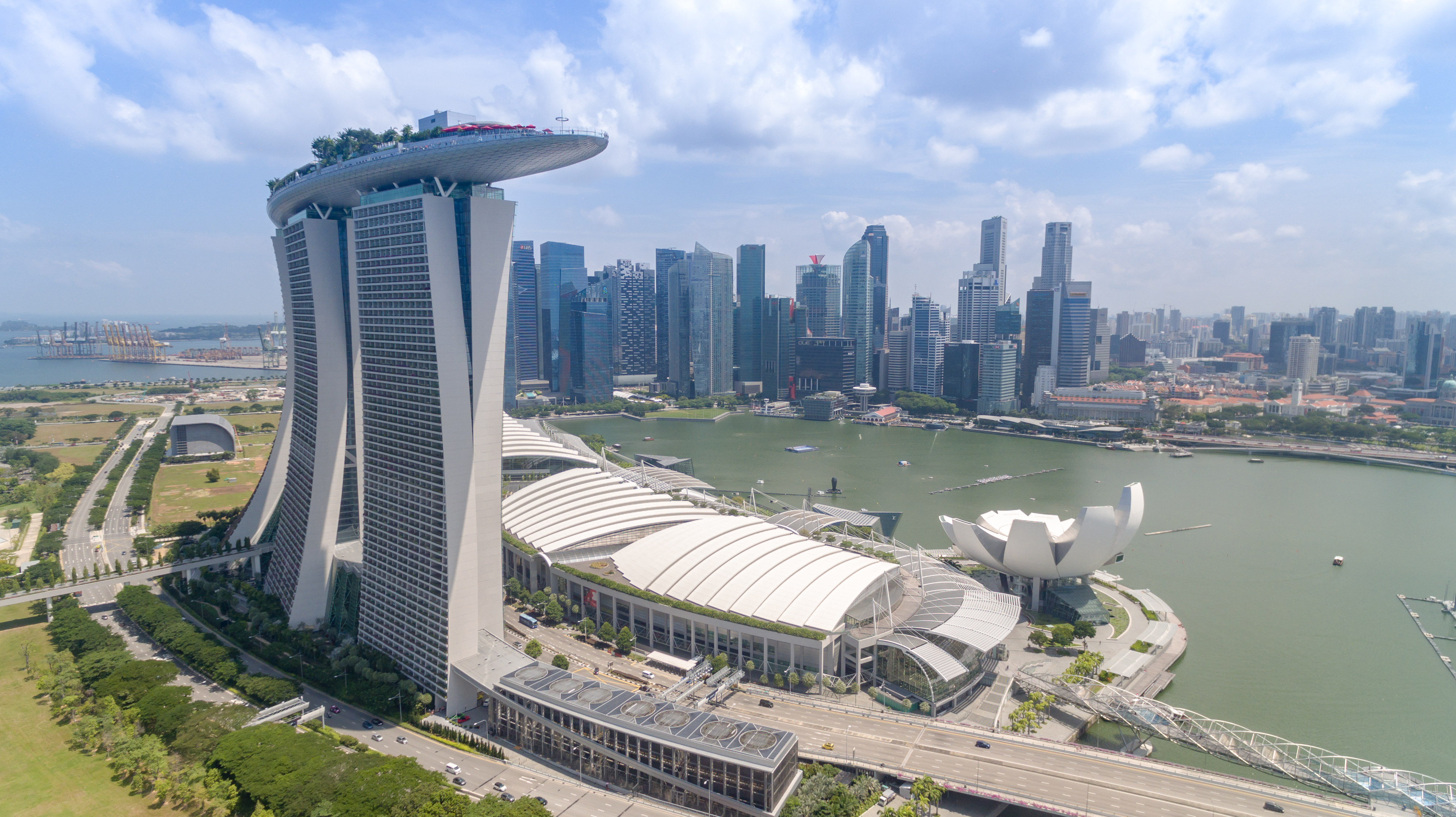 Aerial Marina Bay Singapore